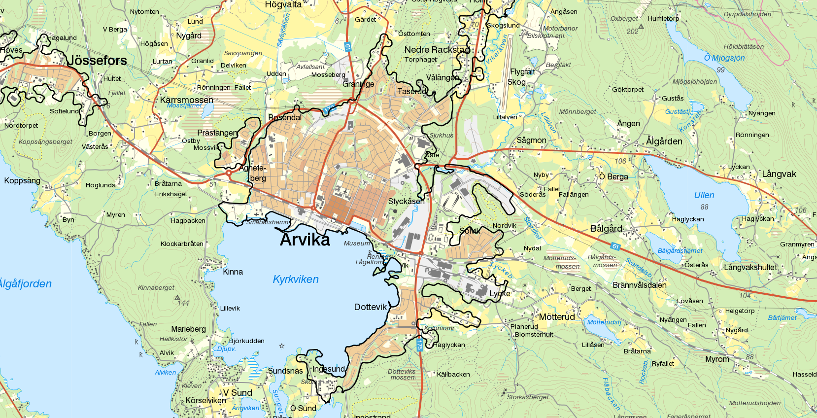 Tätorterna Arvika och Prästängen med gränserna från Statistiska centralbyråns tätortsavgränsning 2015 i svart. Bakgrundskarta från Lantmäteriet, skala 1:30 236.